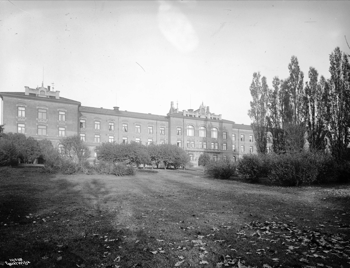 Mogens Thorsens stiftelse, Drammensveien 33, Bellevue løkke, 1917.